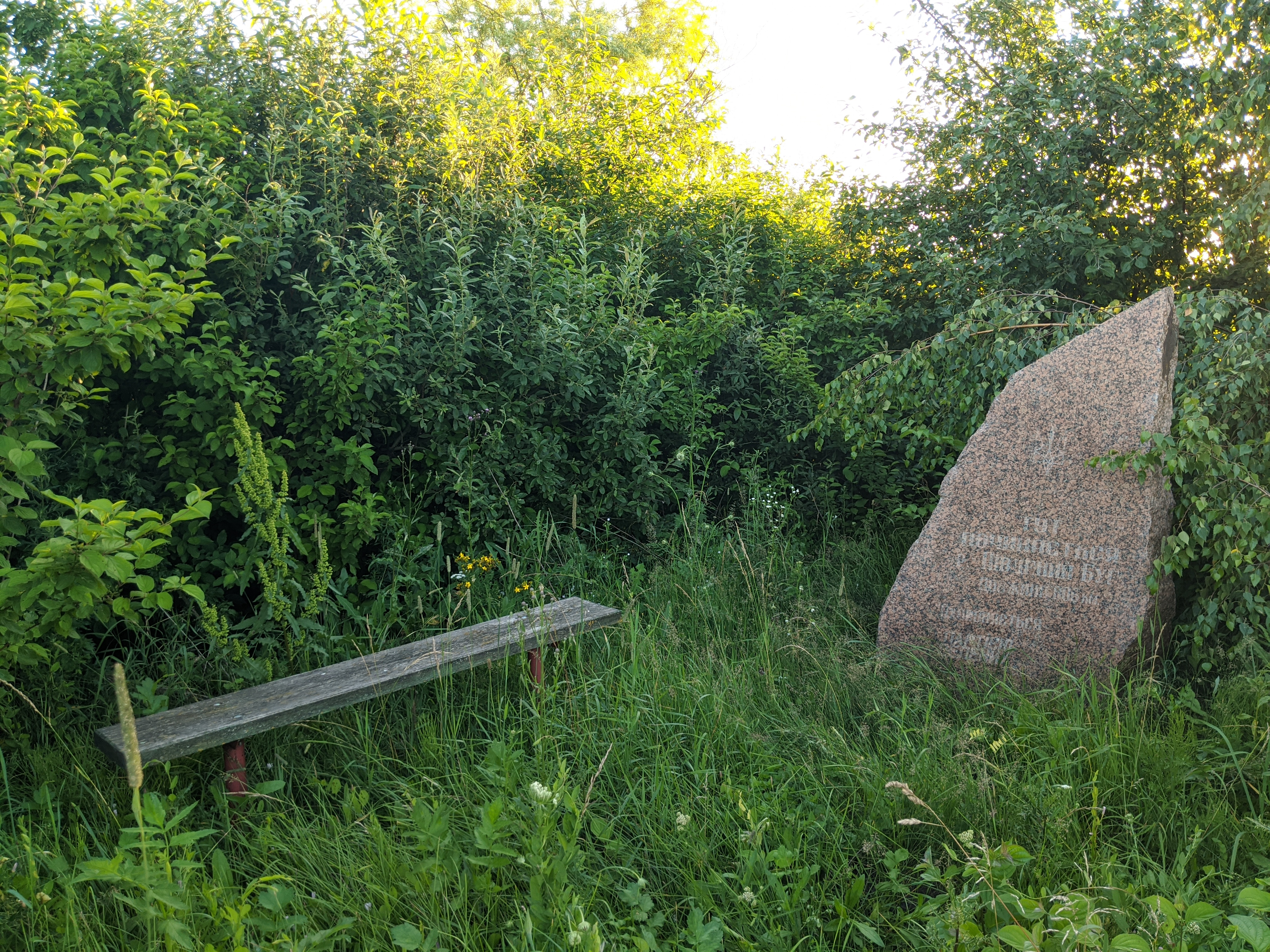 Кам'яна стела встановлена поблизу місця витоку Південного Бугу наделако від села Кушнирівка. Напис на камені: "Тут починається Південний Буг"